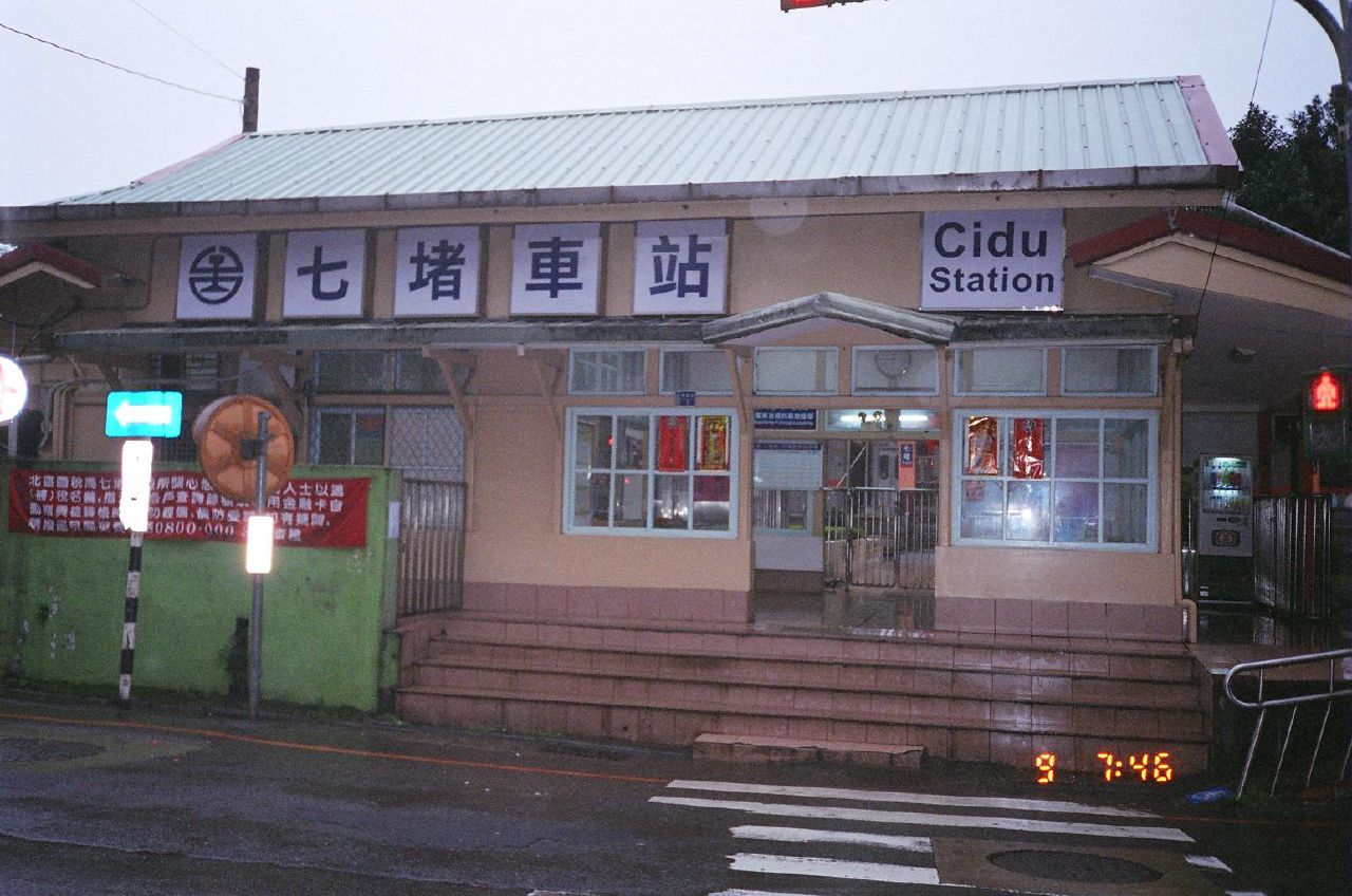 臺灣鐵路管理局七堵車站前站正面外觀。